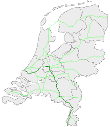 locatie E25 in Nederland, zelf gemaakt